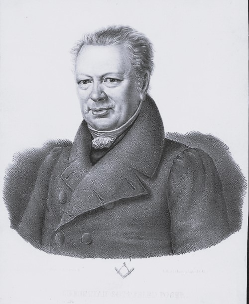 Christian Gottfried Poser (1771-1852), Lehrer am Katharineum zu Lübeck. Gemälde von Achenbach, Litho von I.I.Horup.